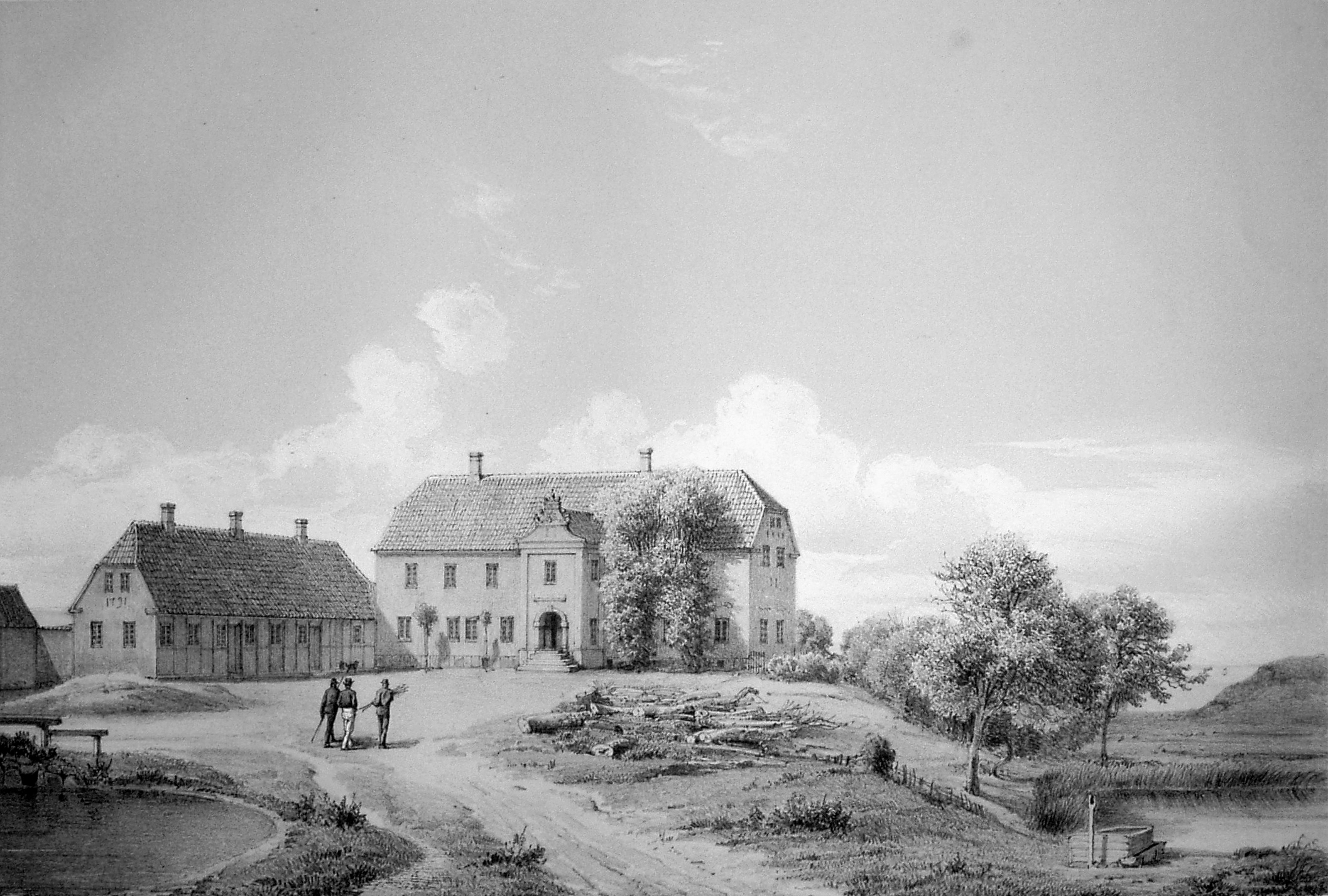 Kås er en hovedgård i Skive Kommune. Kås ligger på vestsiden af Salling, syd for Kås Sø, og øst for den fredede halvø i Kås Hoved ved nordenden af Venø Bugt og sydenden af Kås Bredning i Limfjorden.